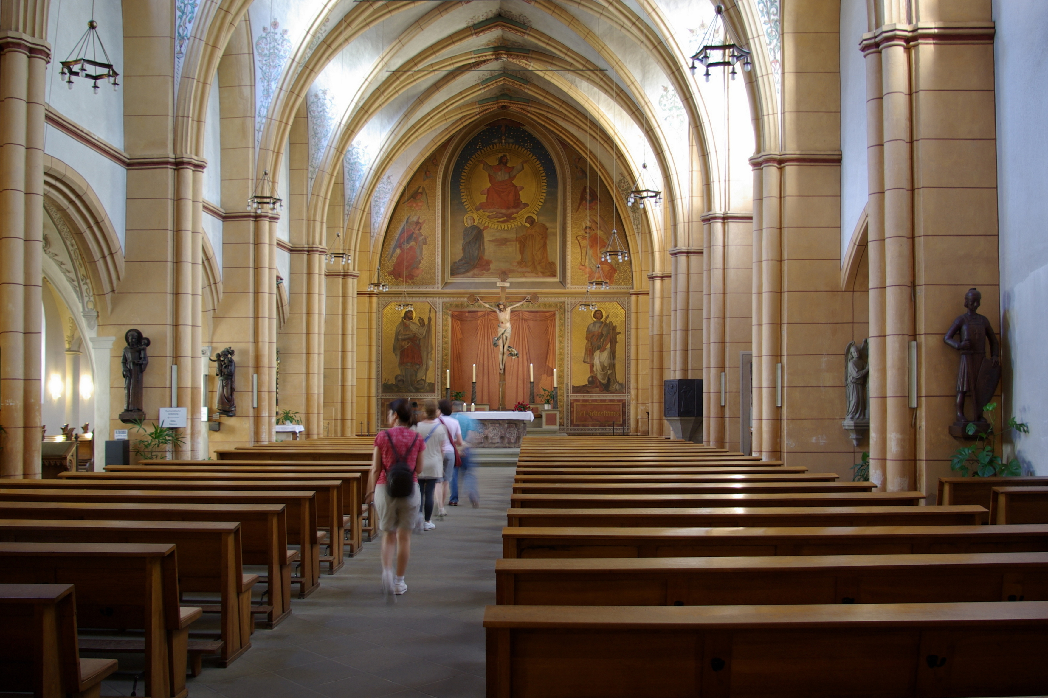 Trier, Sankt Gangolf, Hauptschiff